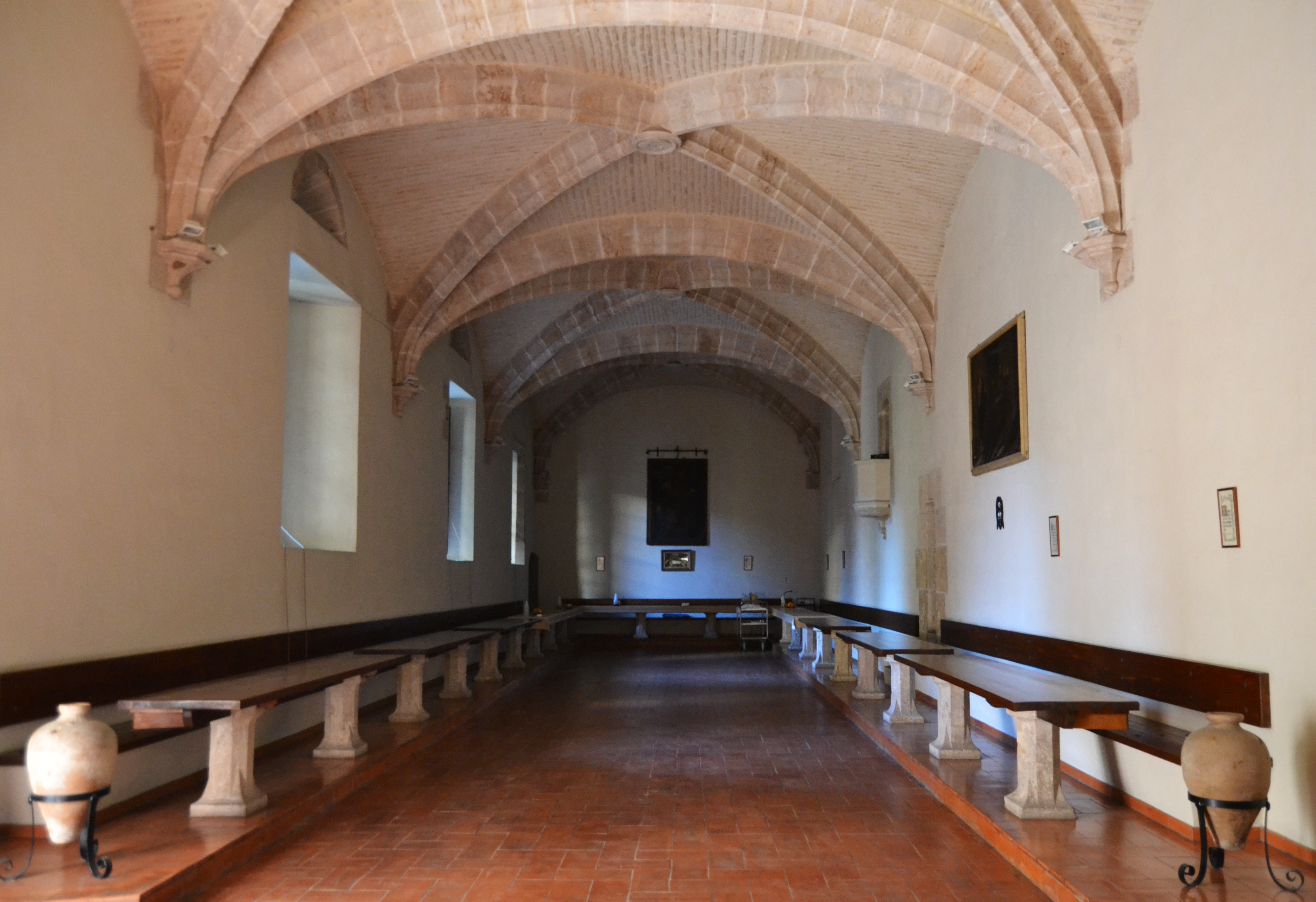 Refetor del monestir de la Trinitat, València.